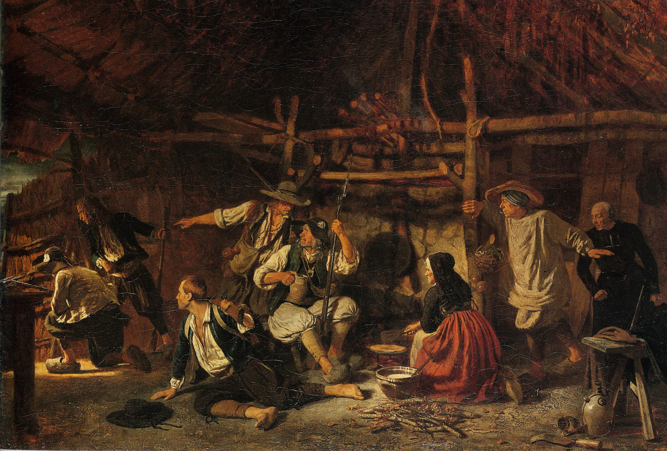 "Chouans"